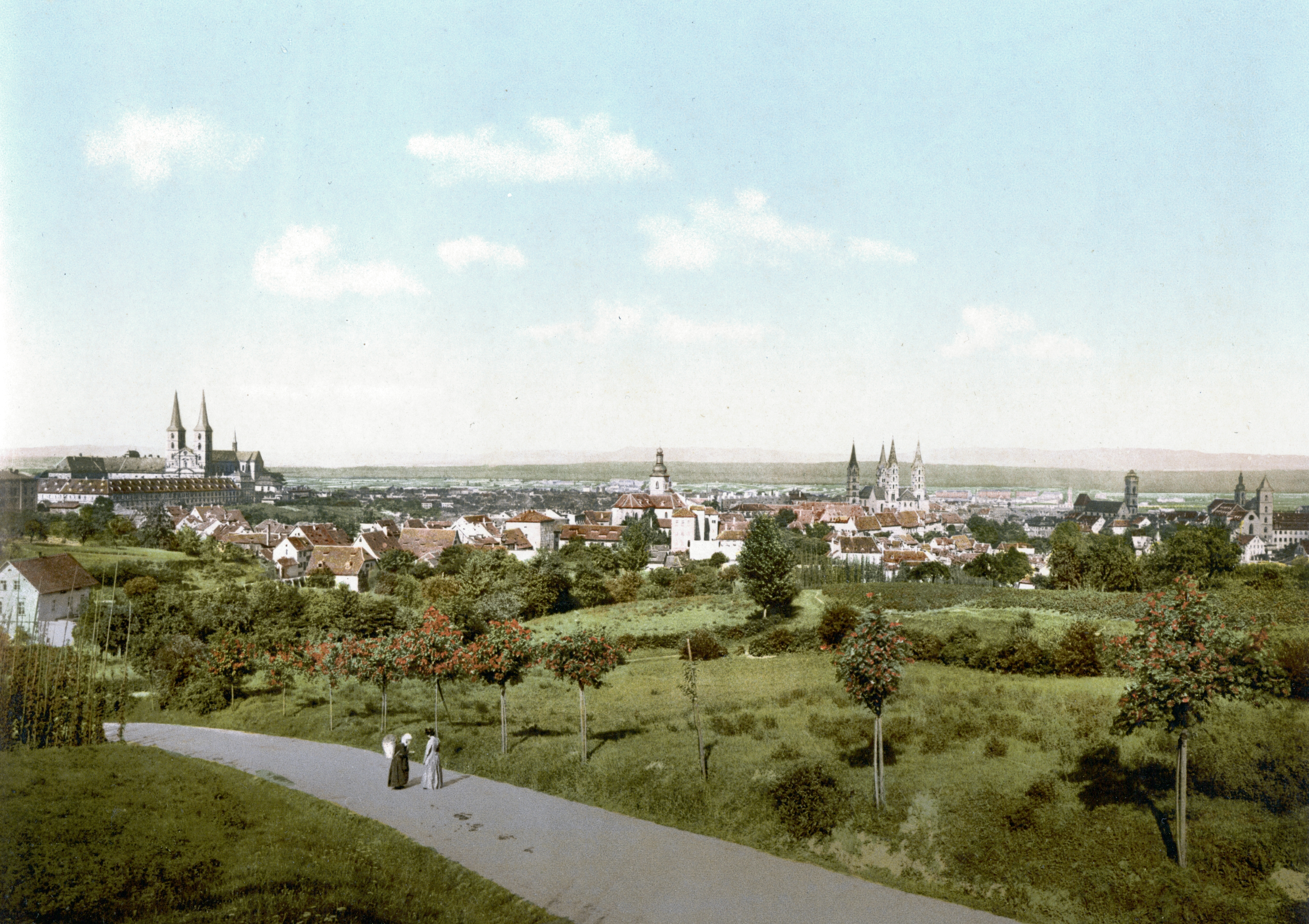 Bamberg